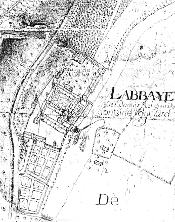 Gravure début 18e représentant l'abbaye de Fontaine-Guérard